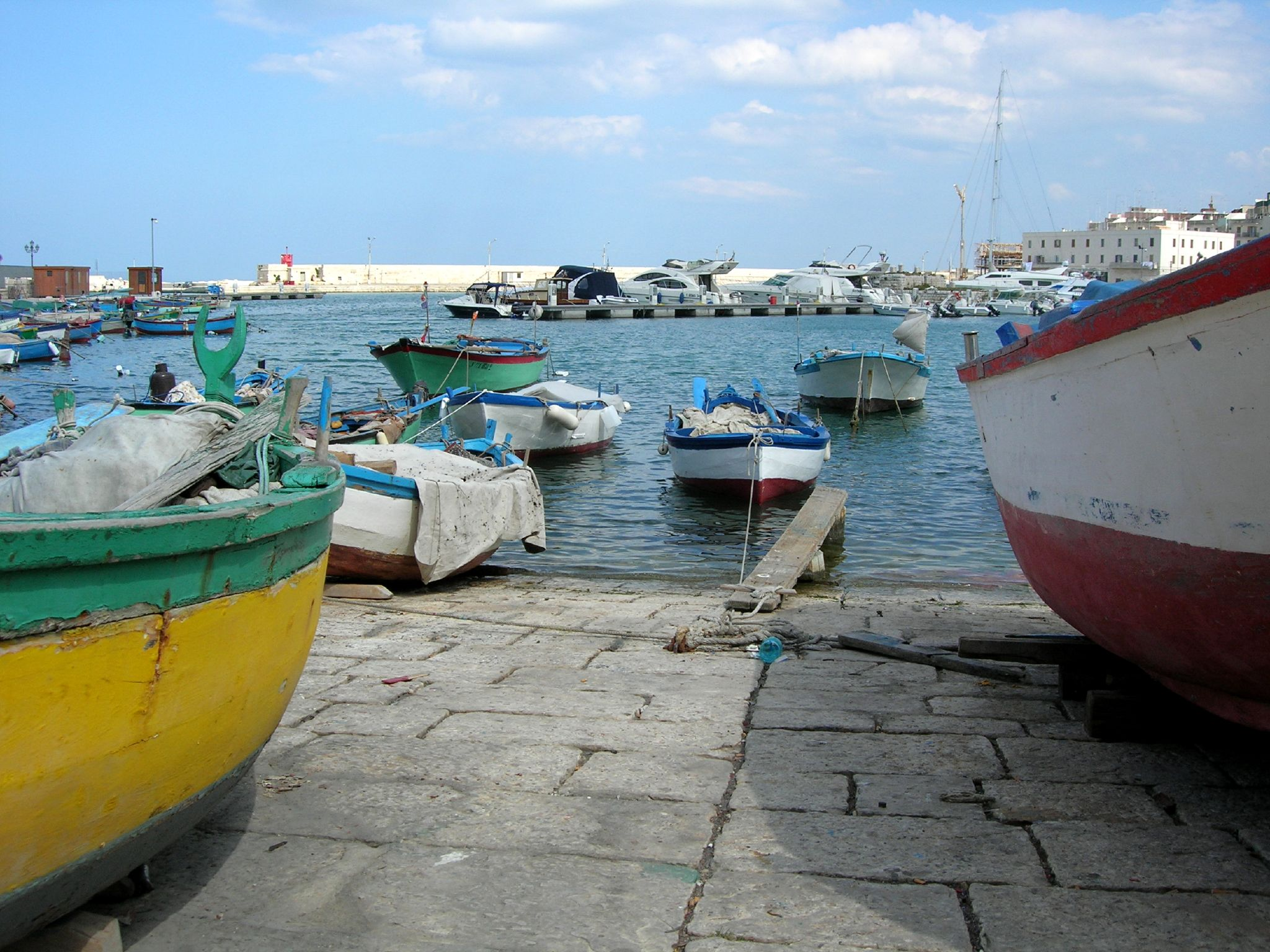 Porto, Bisceglie, Puglia, ItalyDSCN0237